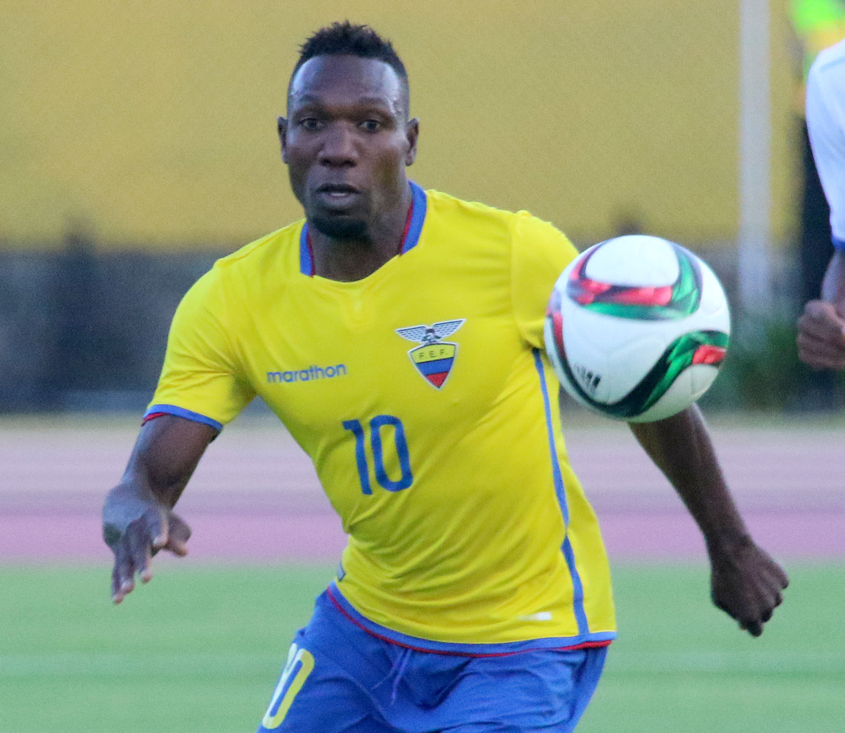 Quito, 08 de sept. (Andes).-Ecuador enfrenta a Honduras en partido amistoso jugado en el estadio Olimpico Atahualpa. En la gráfica Walter Ayoví (10) de Ecuador, disputa el balón con Jerry Bengtson (11) de Honduras. Foto:César Muñoz/Andes